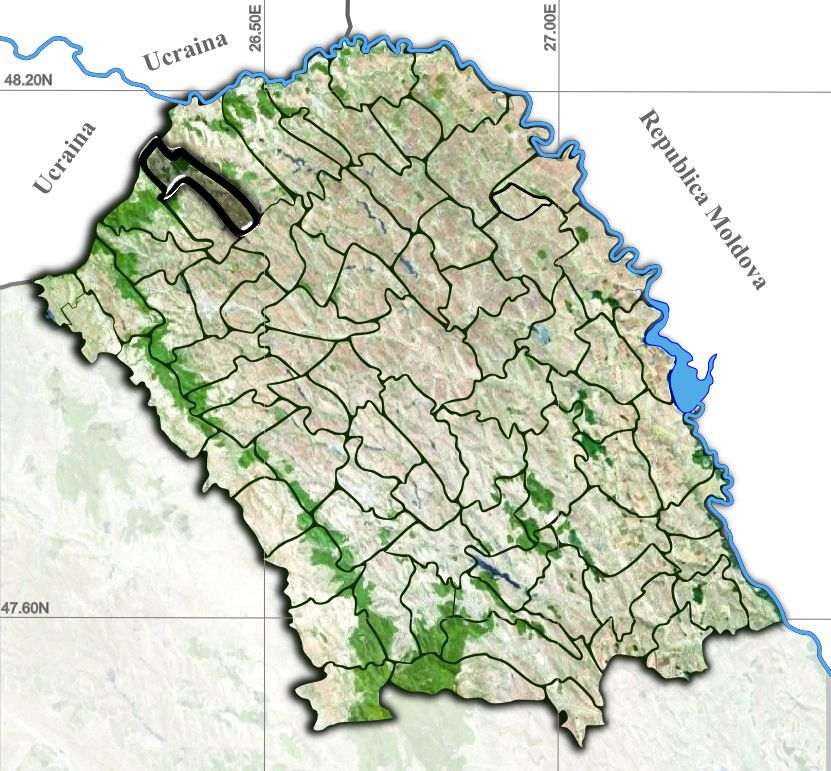 Cristinesti jud Botosani.